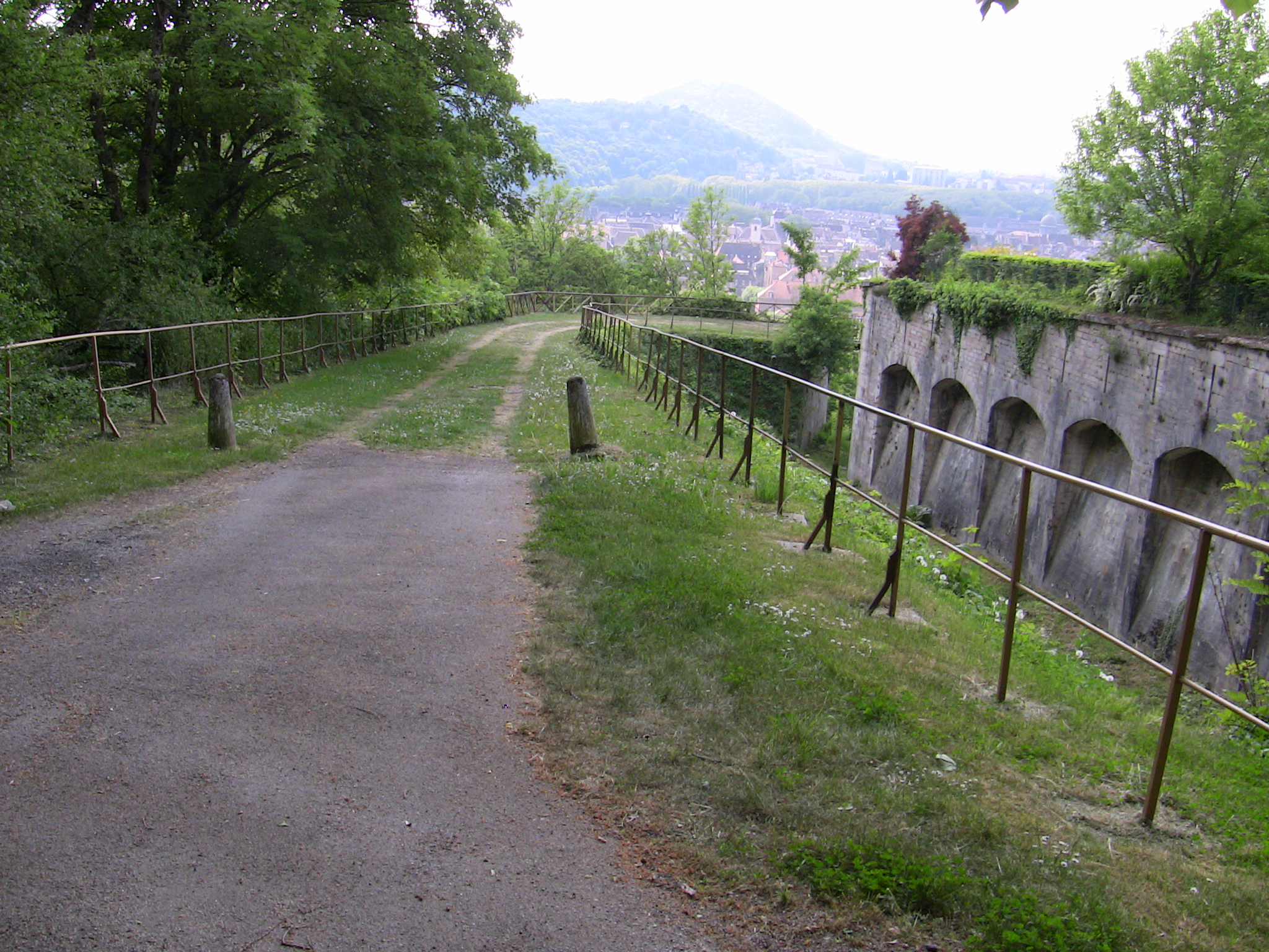 Le chemin d'accès d'origine du fort de Beauregard à Besançon (Doubs, France).